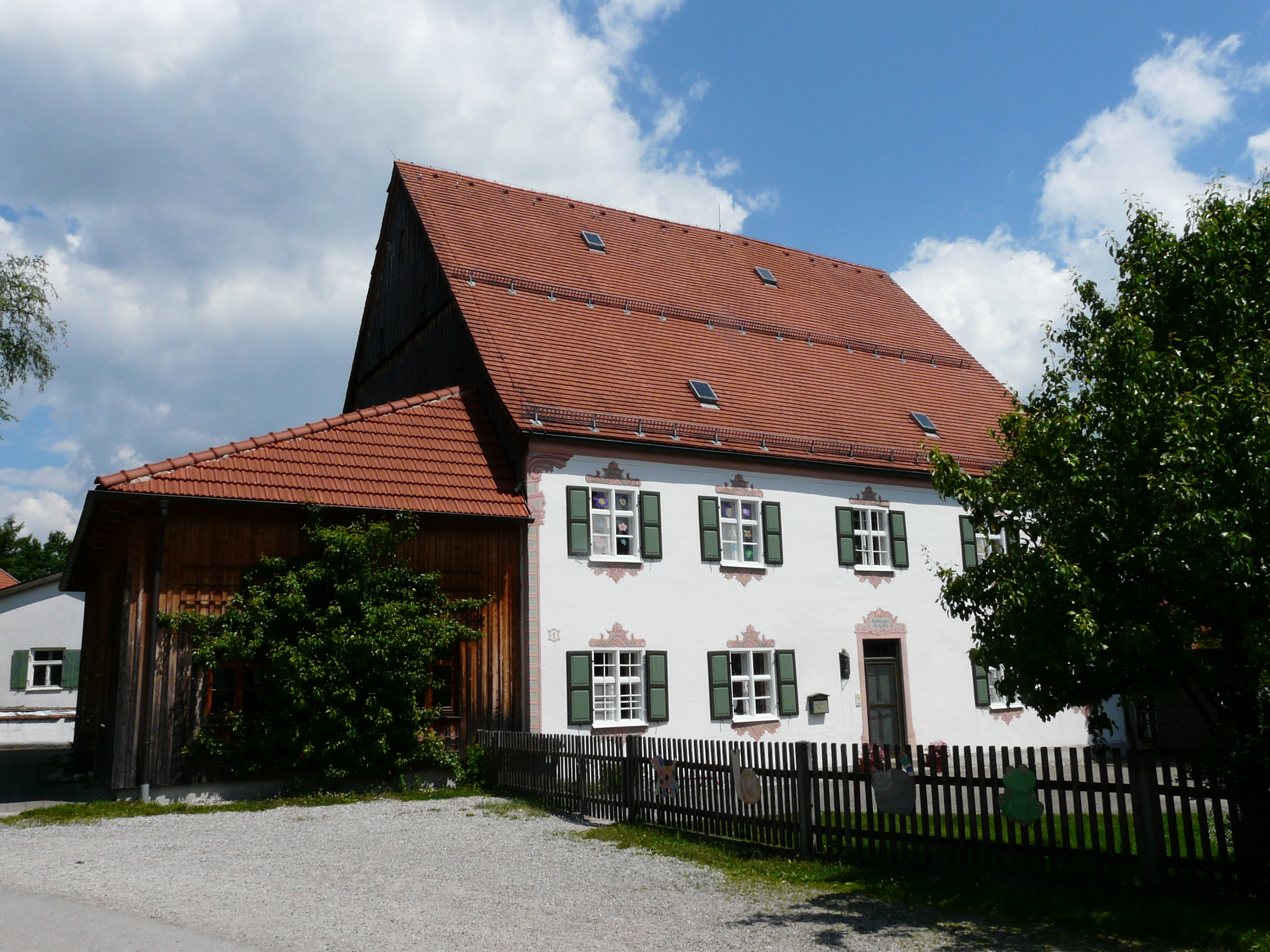 Pfarrgasse 1, Beckstetten, Jengen